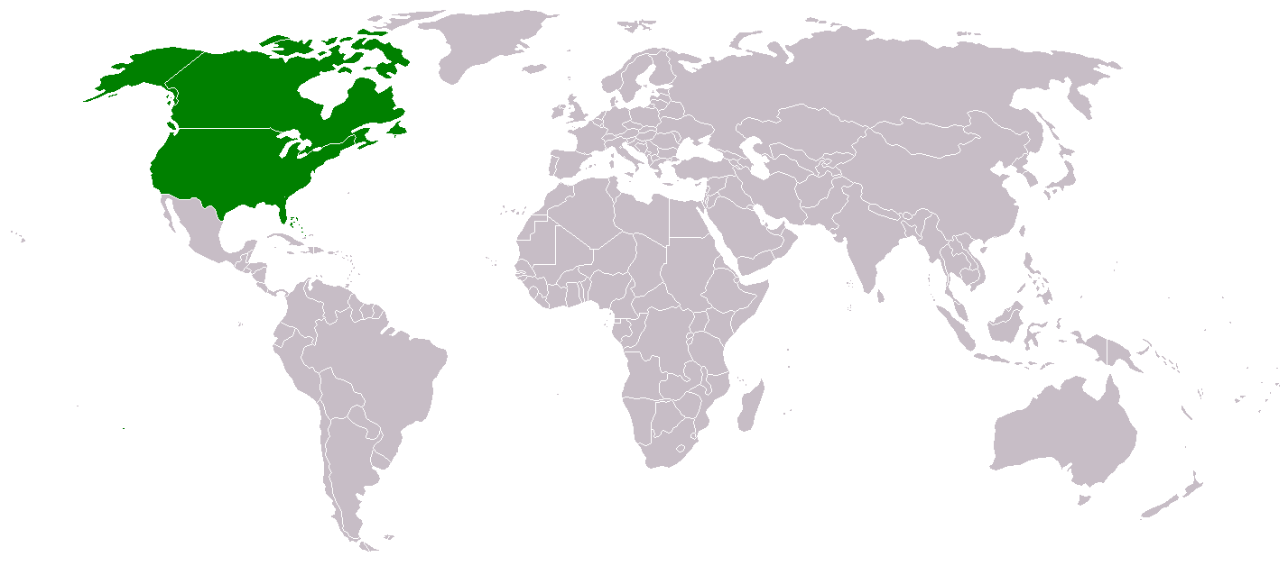 Mapa de America Anglosajona